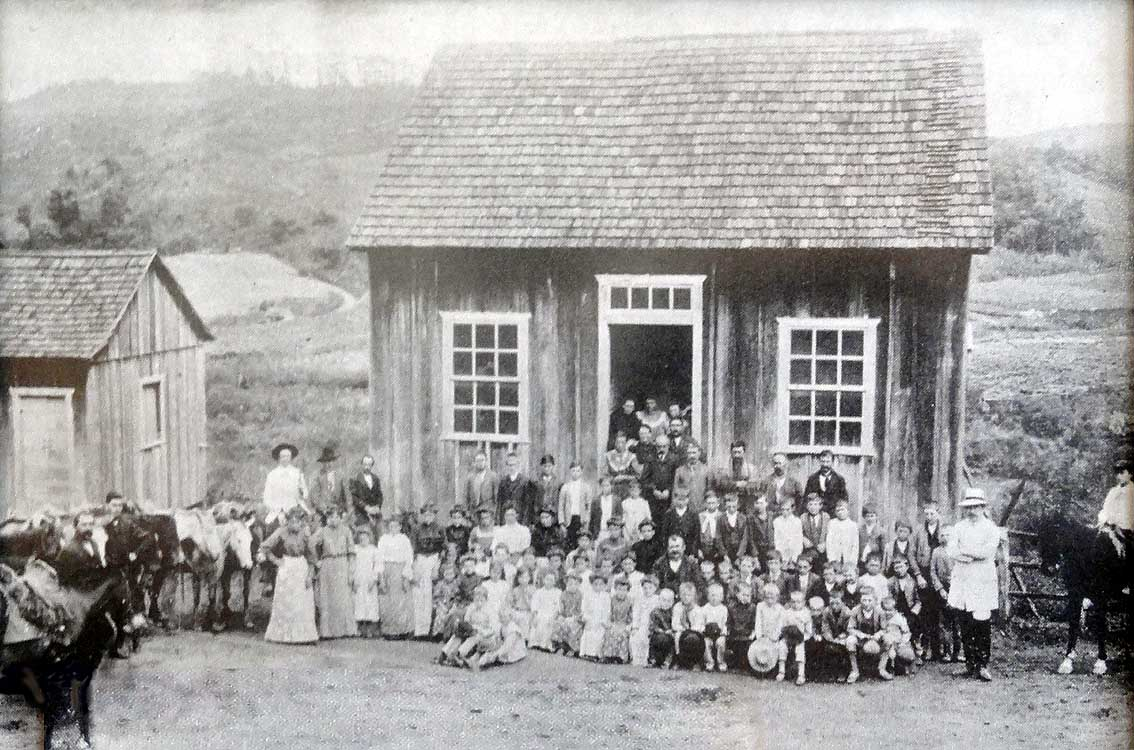 Primeira escola da Comunidade de São Romédio, Caxias do Sul, regida pelo professor Silvio Stalivieri. Foto da visita do agente consular italiano Domingos Bersani em 1908.